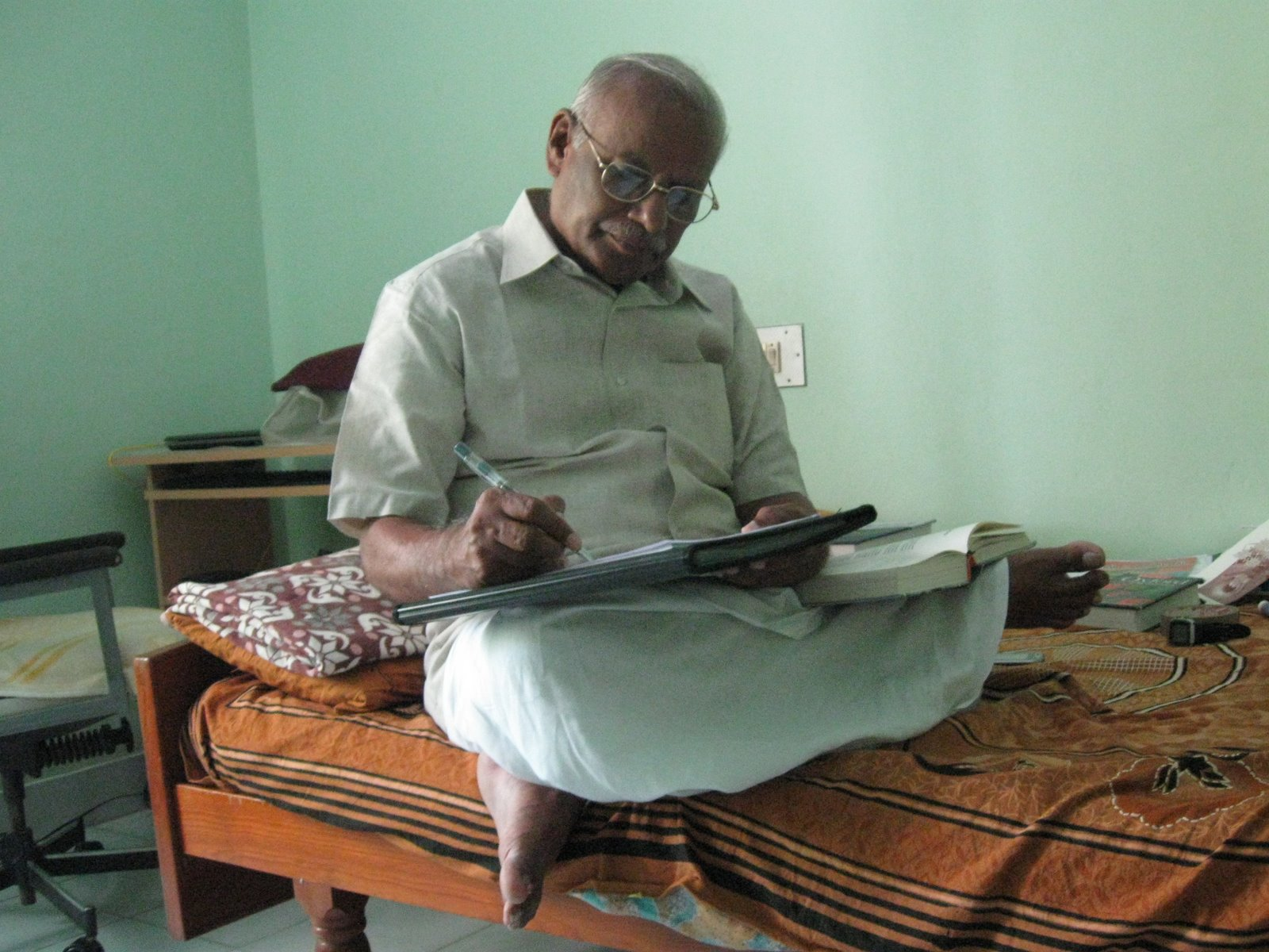 தமிழ்நாட்டின் சிறந்த கவிஞரும் இருமுறை சாகித்திய அகாதெமி விருது பெற்றவரும், சாகித்திய அகாதெமியின் தமிழ் ஆலோசனைக்குழு தலைவருமாகிய சிற்பி பாலசுப்பிரமணியம்.